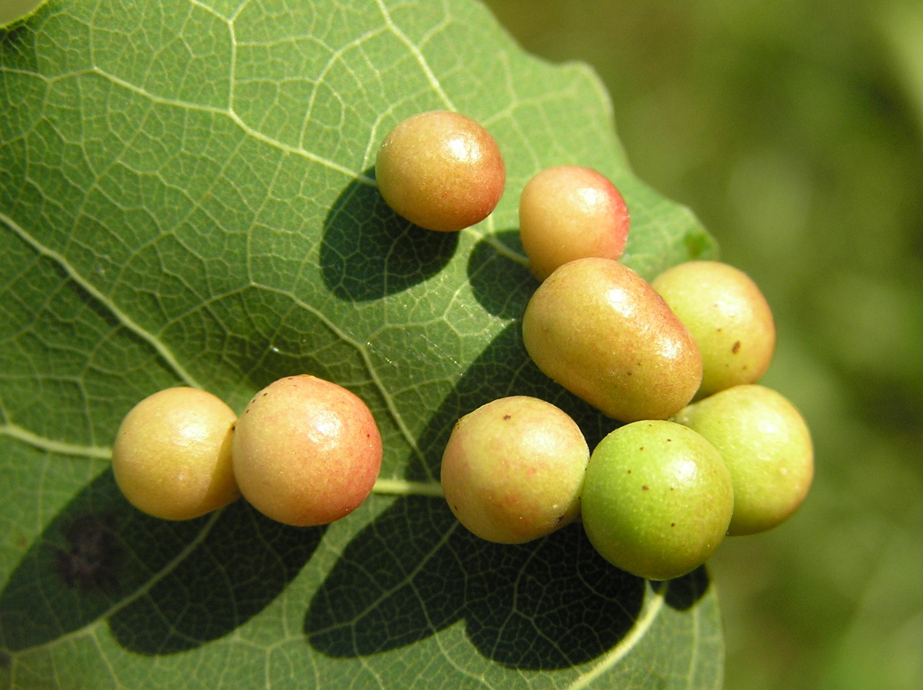 Harmandia loevi Rübs. Białowieża, Polska